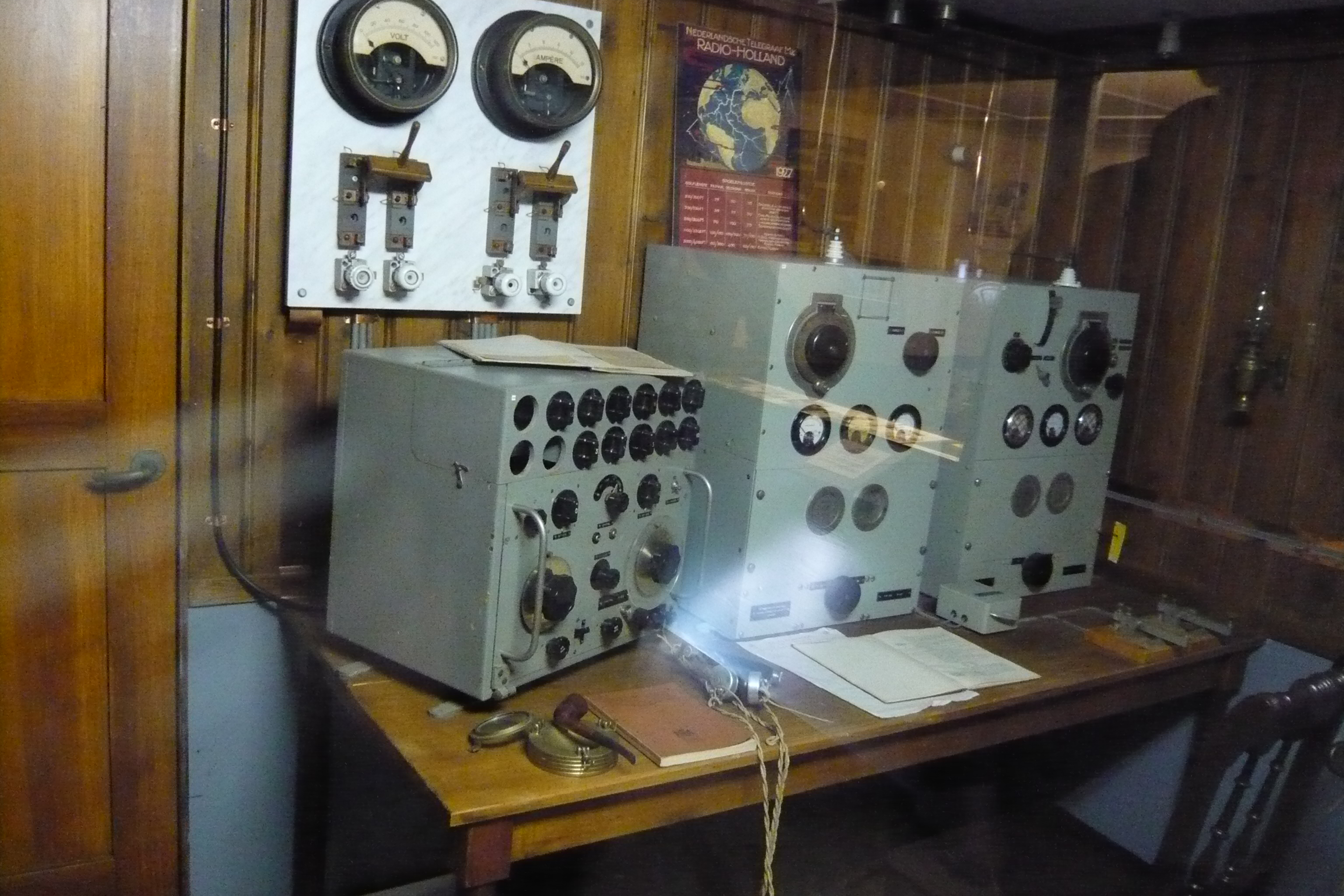 IJmuider Zee- en Havenmuseum 'de Visserijschool', Havenkade 55, IJmuiden Radio Holland - Marconi combinatie 533-719 uit 1935